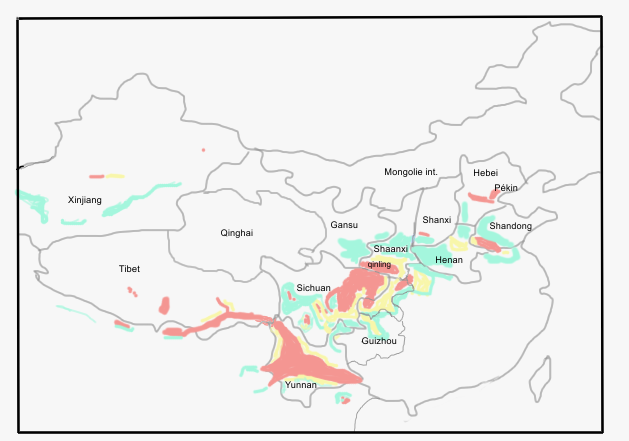 tiré de Feng et al. The Phytogeographic History of Common Walnut in China Front Plant Science, 2018, 9